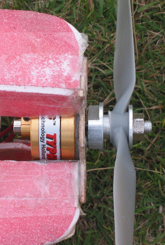 zelfgemaakte foto van borstelloze elektromotor